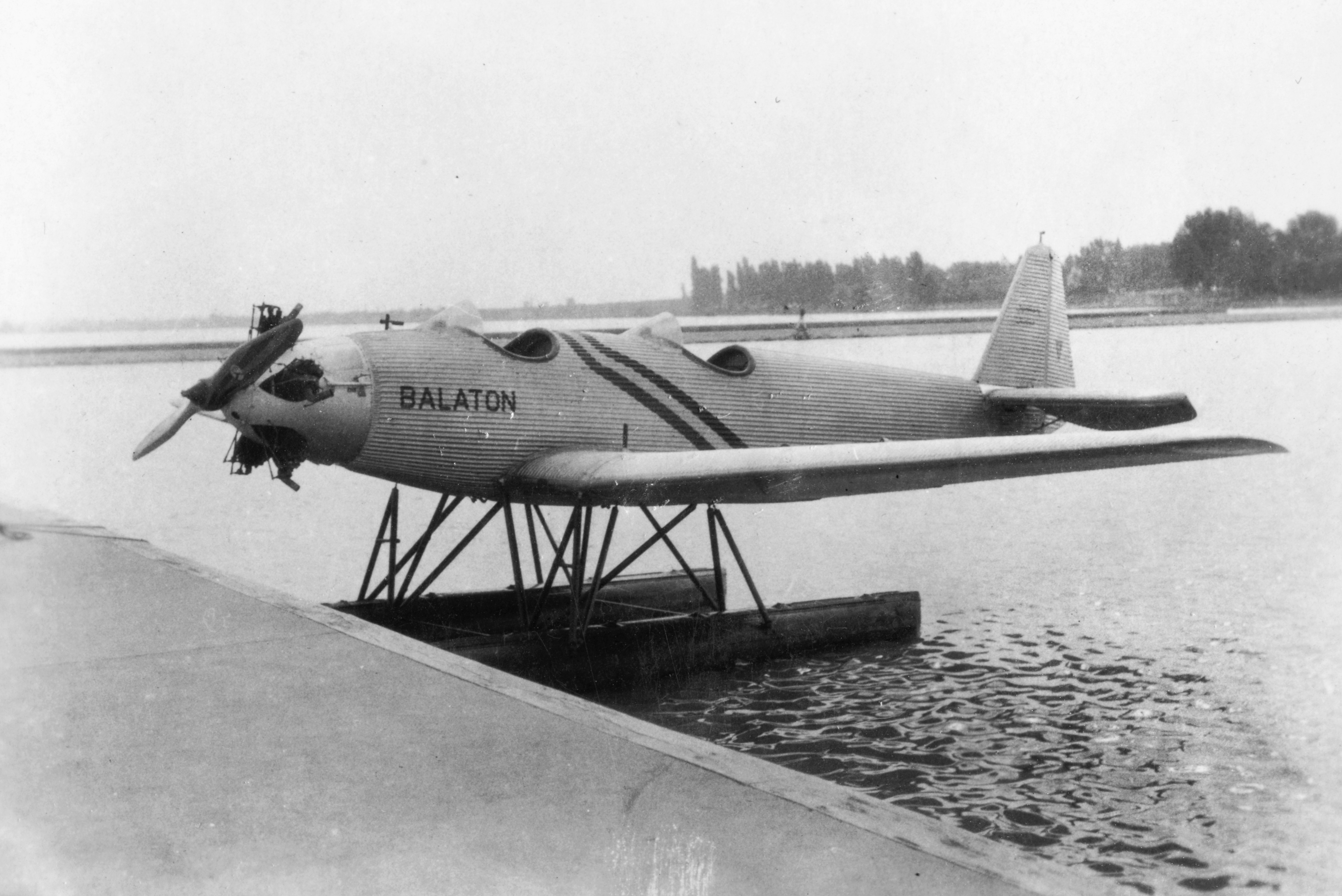 Junkers A-50 Junior hidroplán kiképző repülőgép a Balatonon. Location: Hungary, Balatonújhely Tags: transport, vehicle, airplane, Junkers-brand, hydroplane, Gerrman brand Title: Junkers A-50 Junior hidroplán kiképző repülőgép a Balatonon.